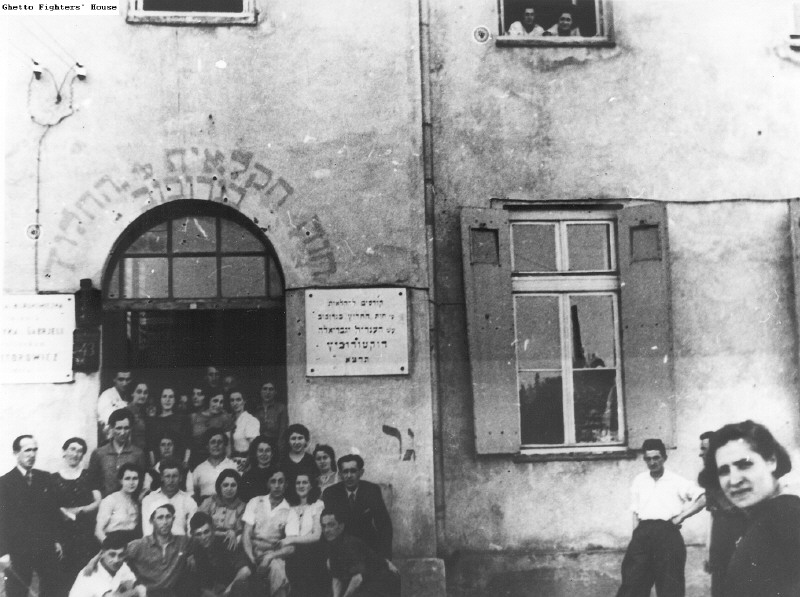 קבוצה מאנשי "החלוץ" בחזית הבניין הראשי בגרוכוב